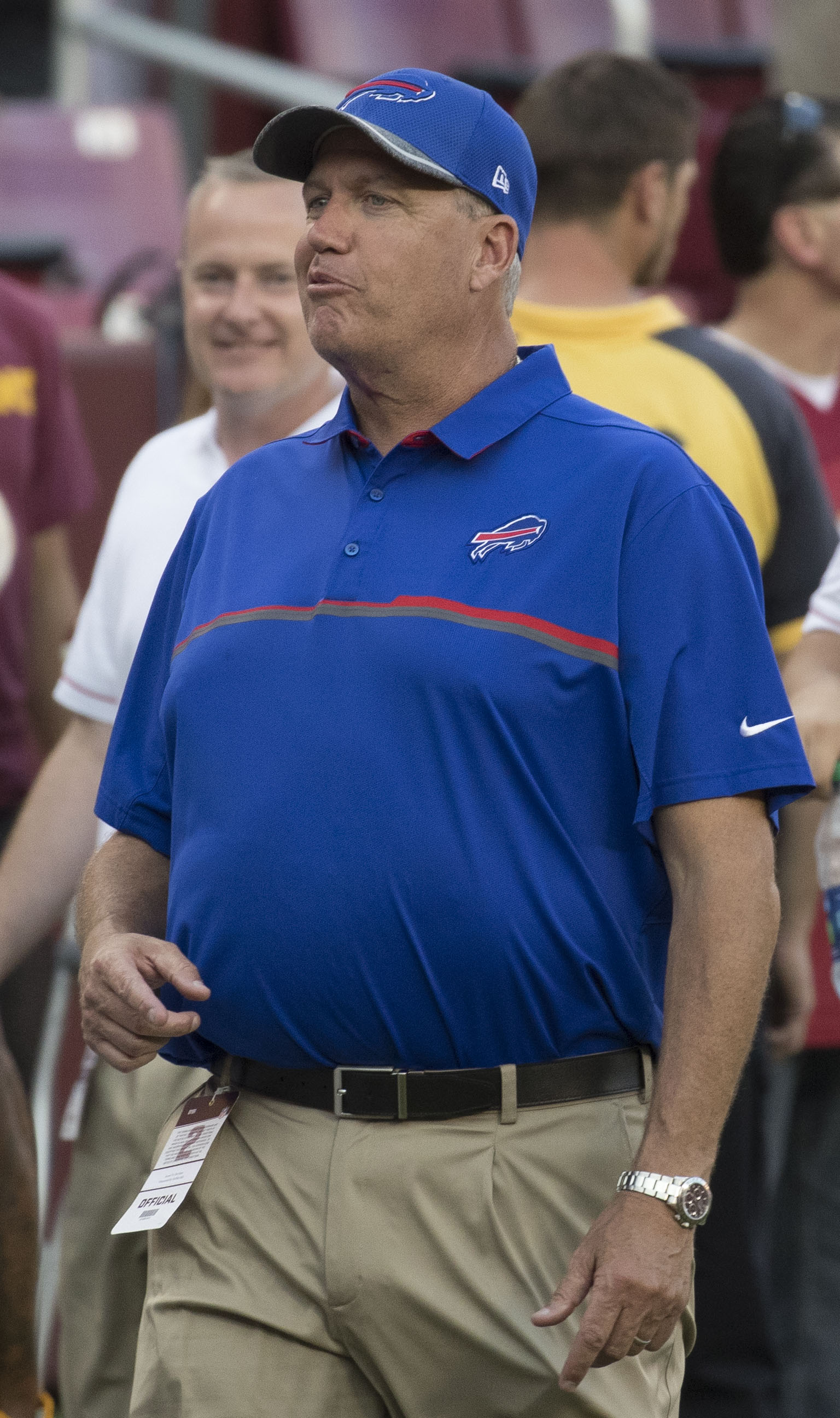 Bills at Redskins 8/26/16